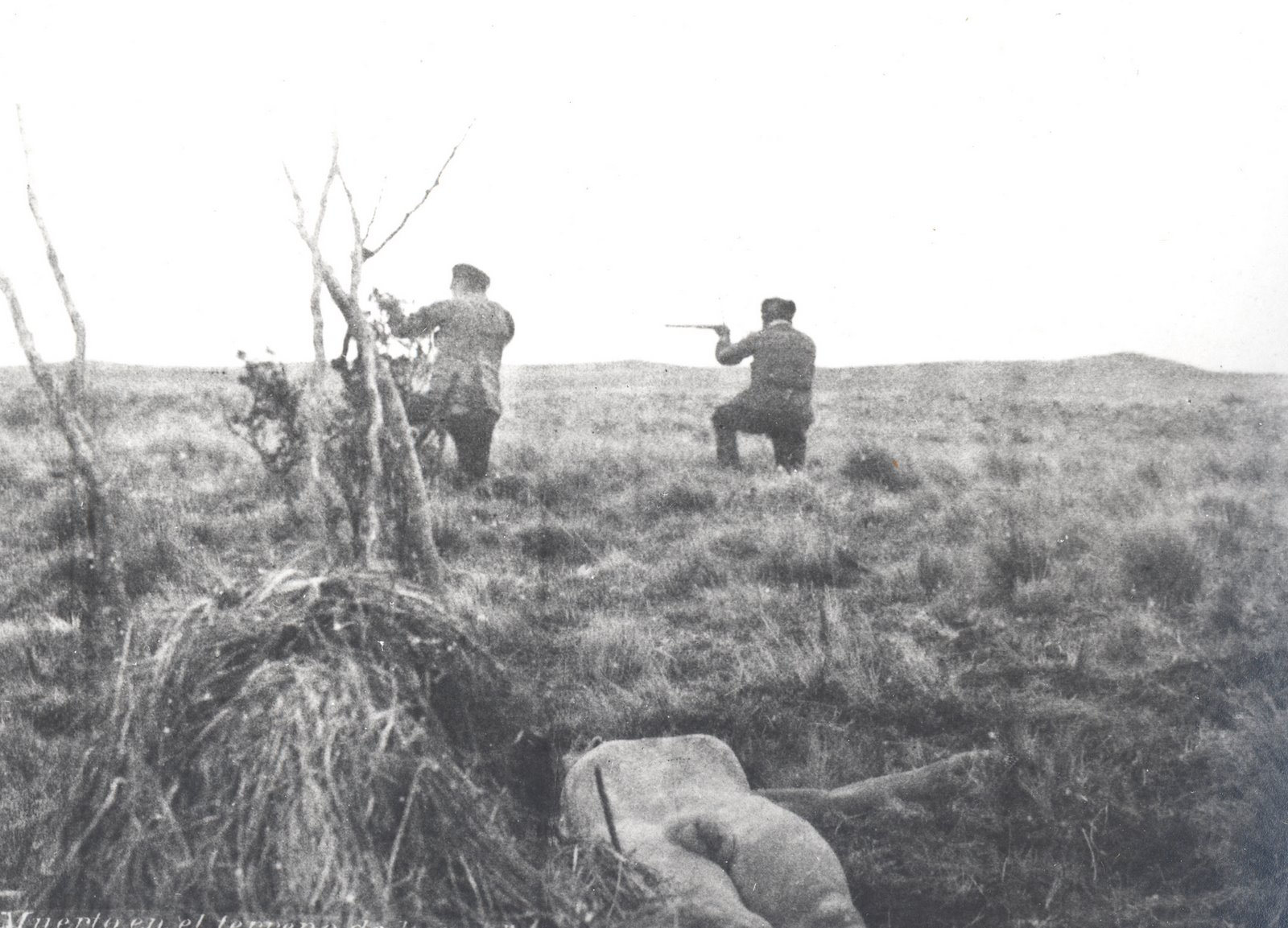 selk’nam asesinado por los soldados de Popper.